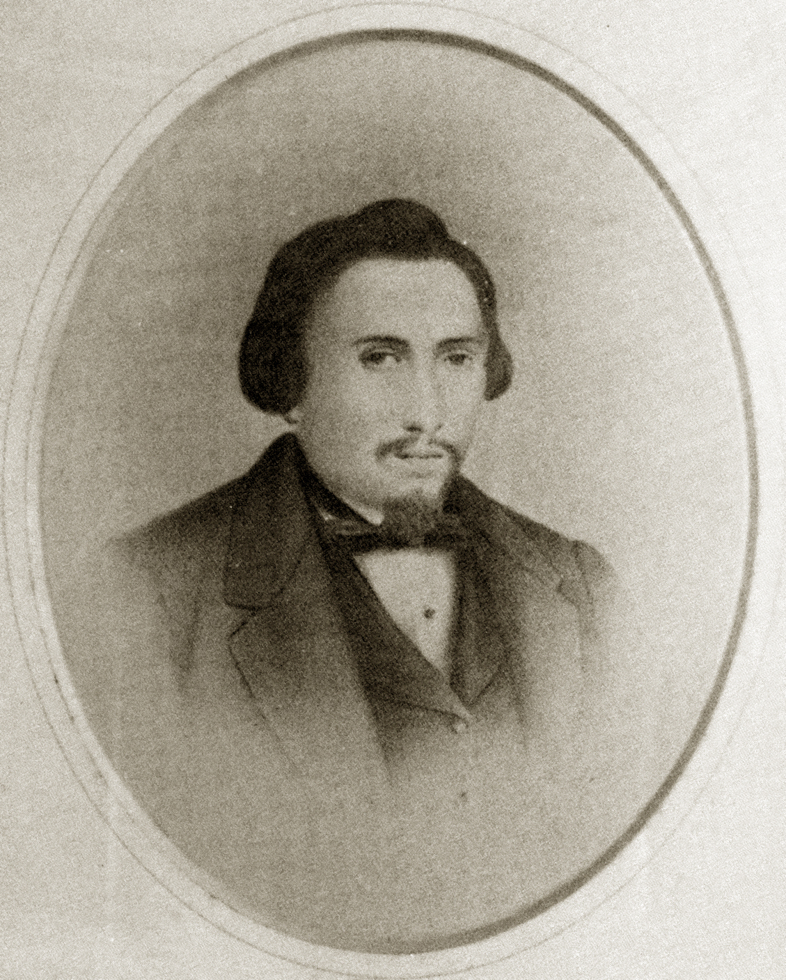 Foto di Salvatore Spinuzza eroe risorgimentale Cefaludese.